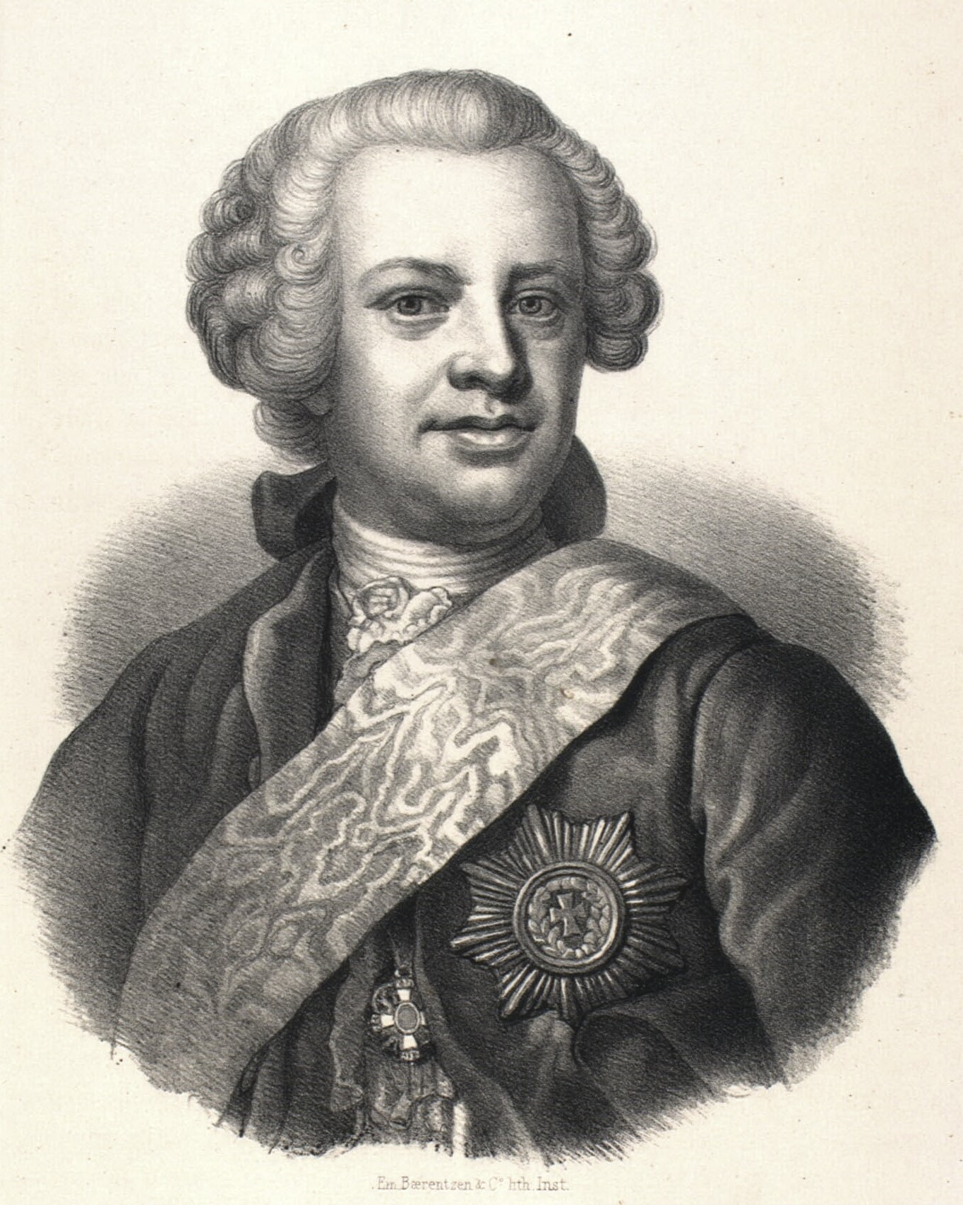 JHE Bernstorff